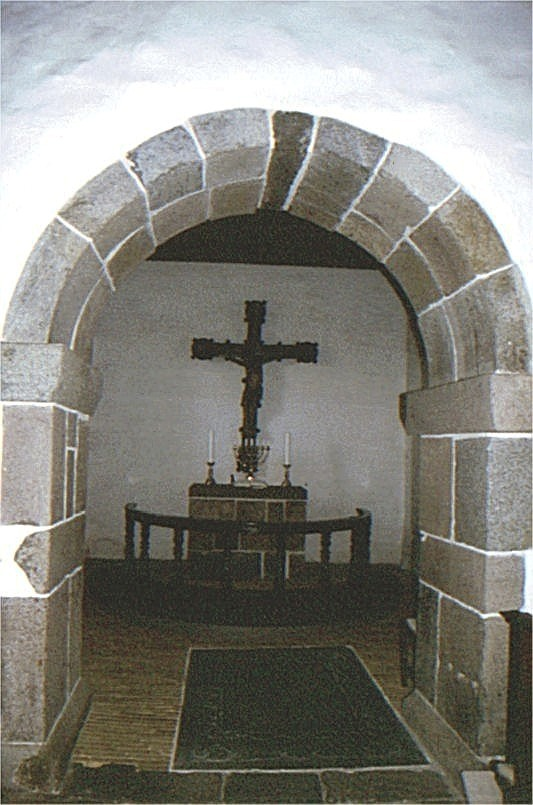 Fiskbæk Kirke korbue, Viborg Kommune, Jylland, Denmark